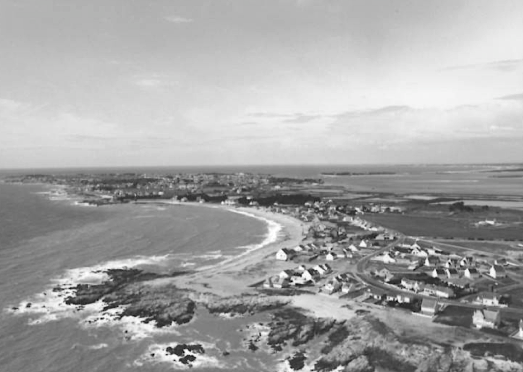 Batz-sur-Mer - Photo aérienne - mai 1977